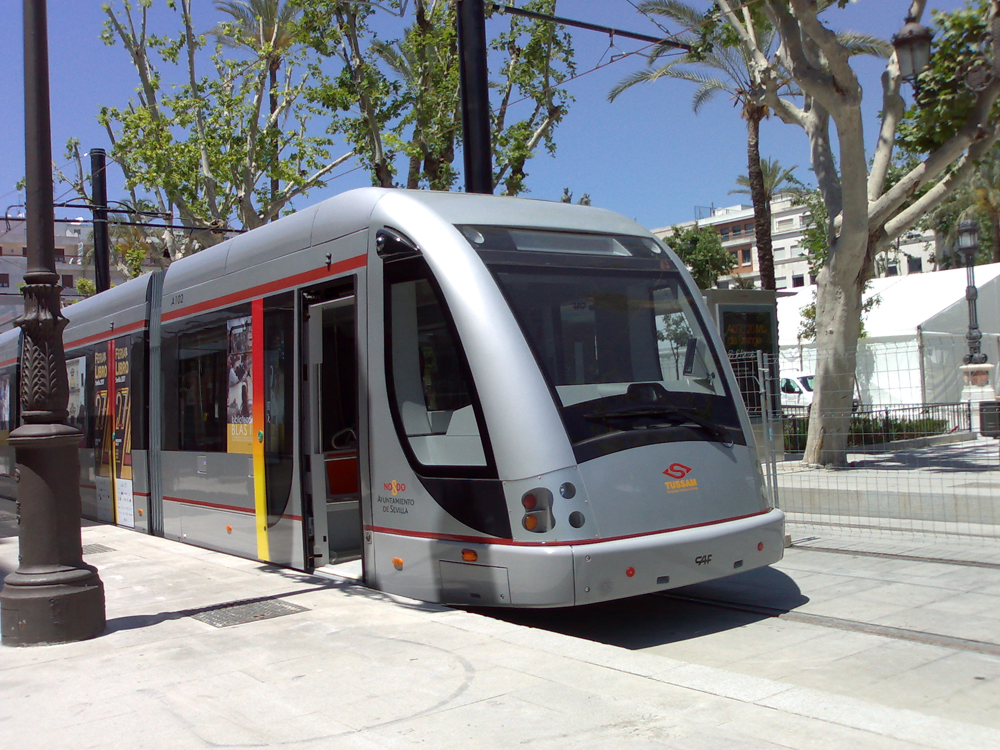 El Metro-centro de Sevilla en periodo de pruebas.